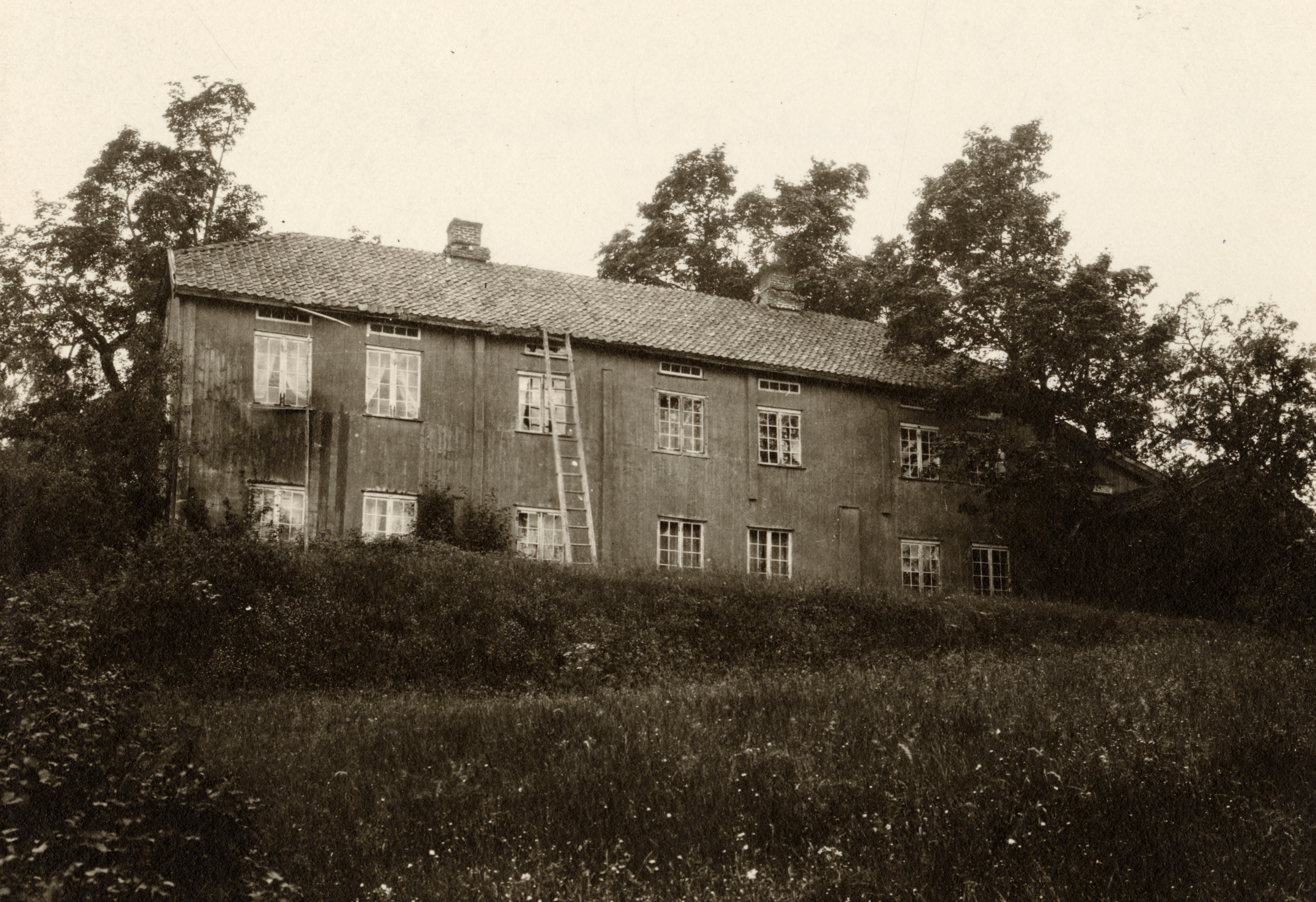 Stenberg i Vestre Toten, Oppland